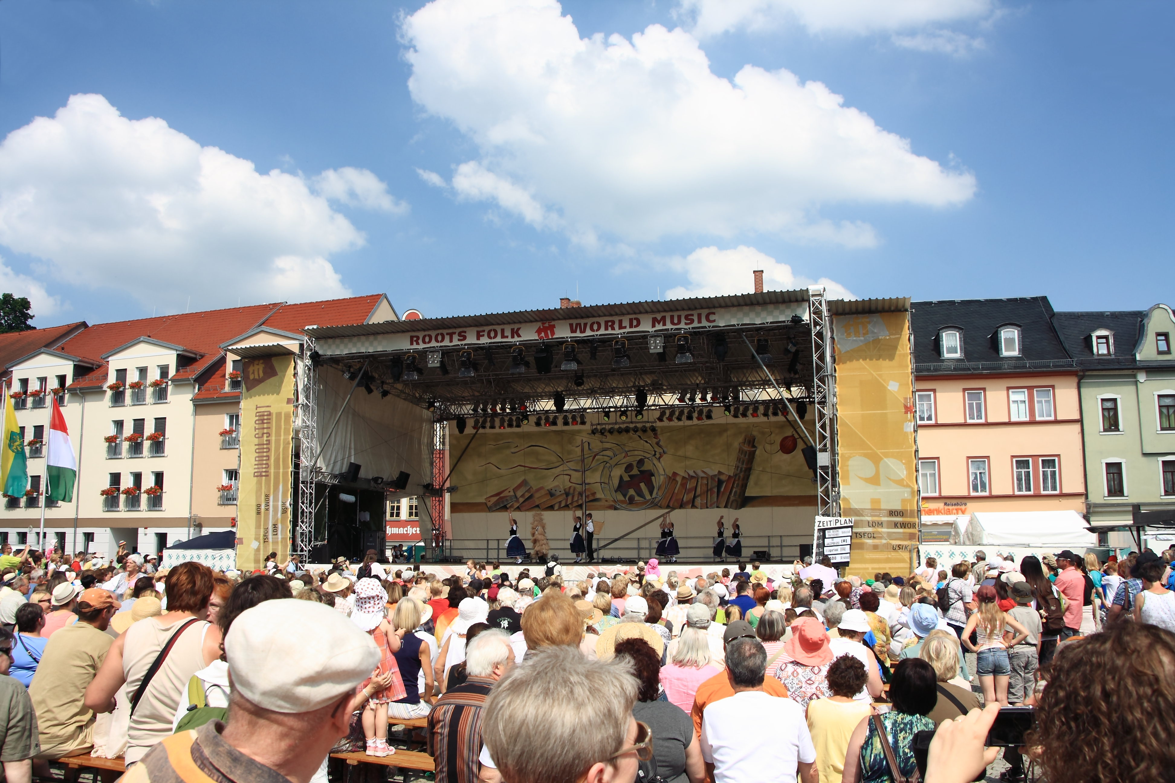 Die große Marktbühne beim Auftritt der Kindertanzgruppe des Thüringer Folkloretanzensembles.